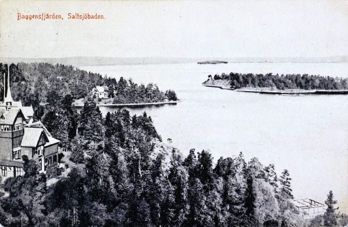 Baggensfjärden med Villa Acke längst till vänster. I bakgrunden syns Nygrens villa på Baggensudden och ön Sumpholmen